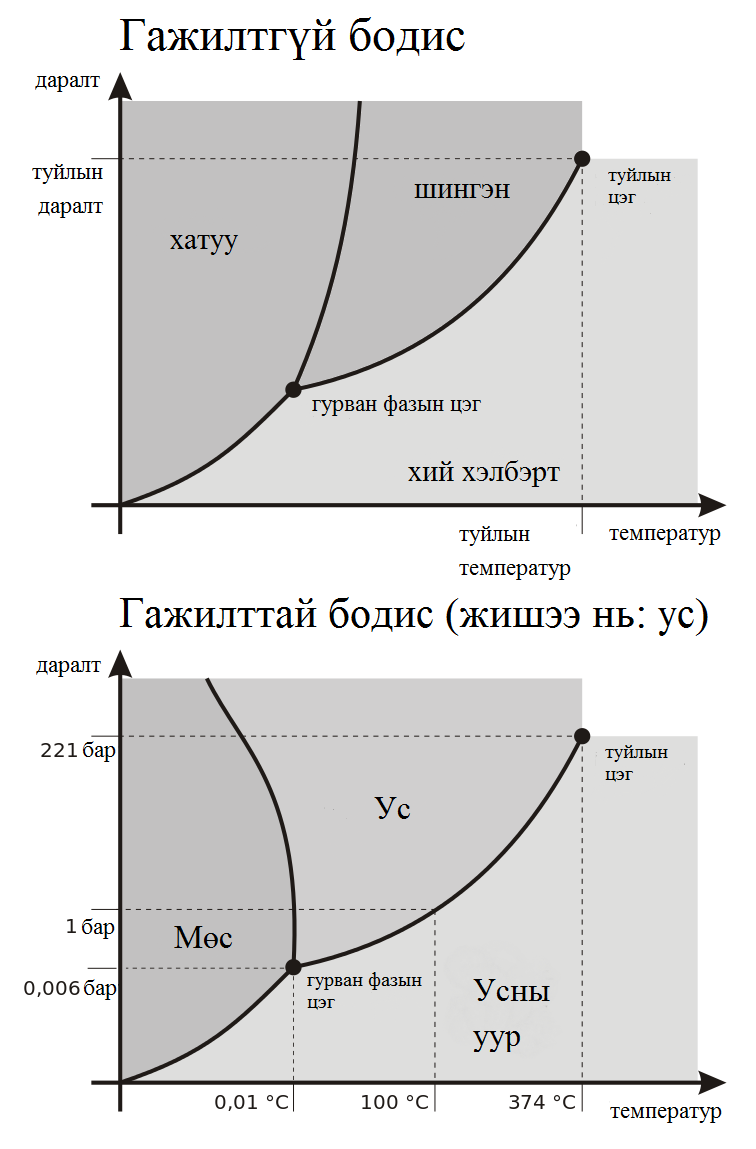 Монгол: Гурван фазын цэг